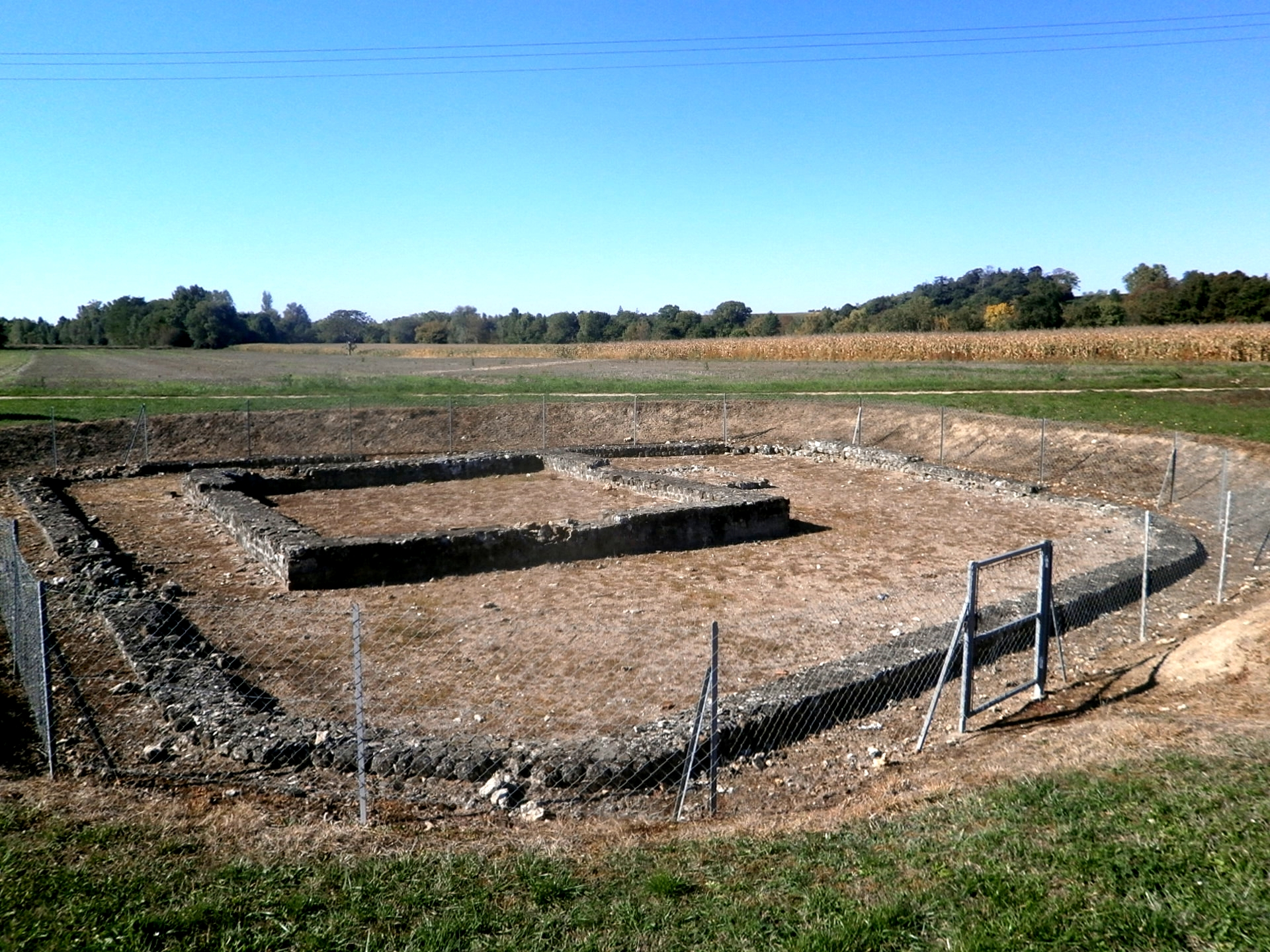 Le fanum antique du site de Thésée-Pouillé